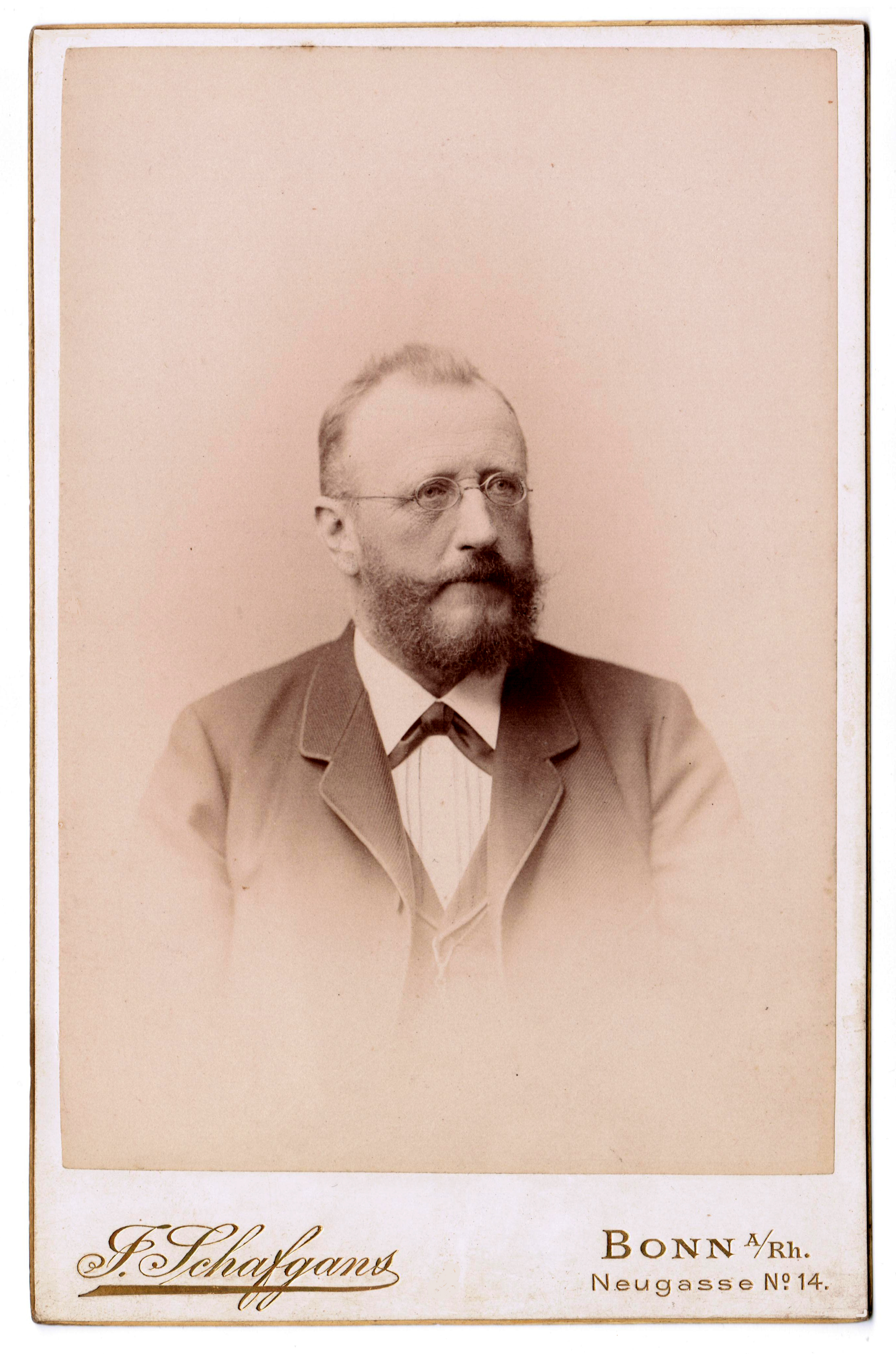 Adalbert Colsman 1839 - 1917, Seidenfabrikant aus Langenberg Rheinland (vor 1898)